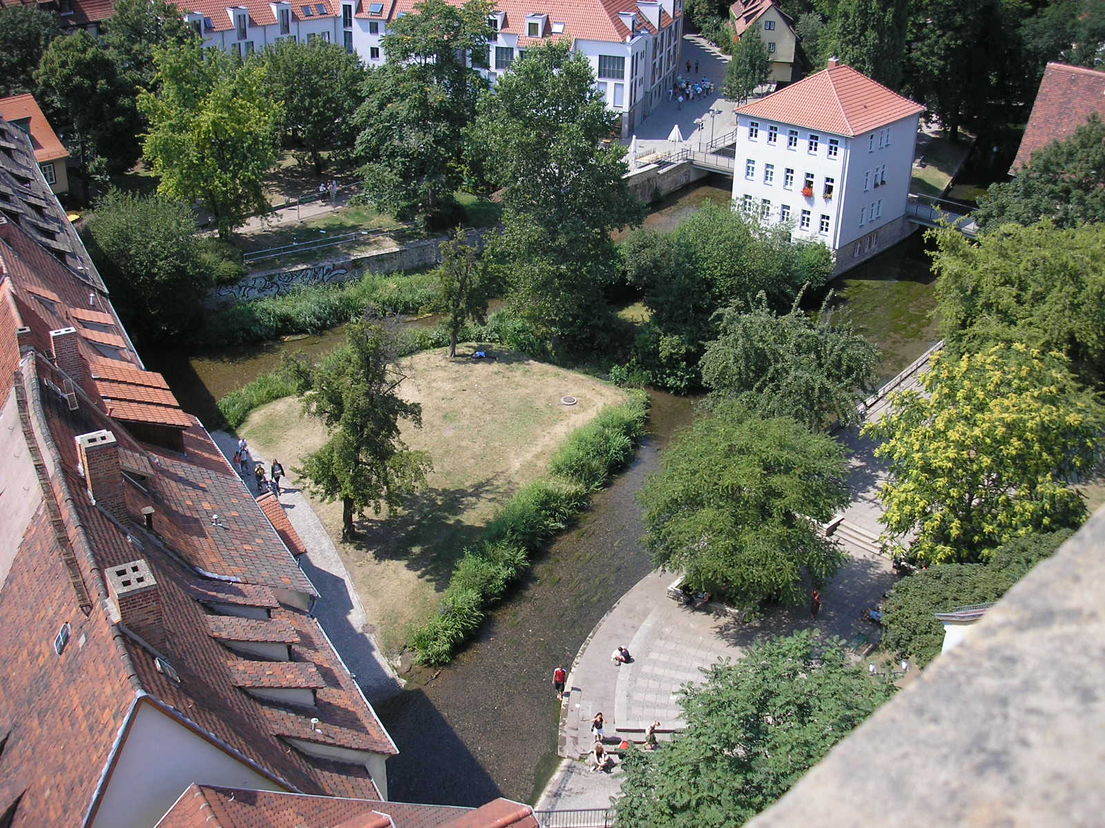 Die Gera unterhalb der Krämerbrücke in Erfurt (Blick vom Roten Turm).